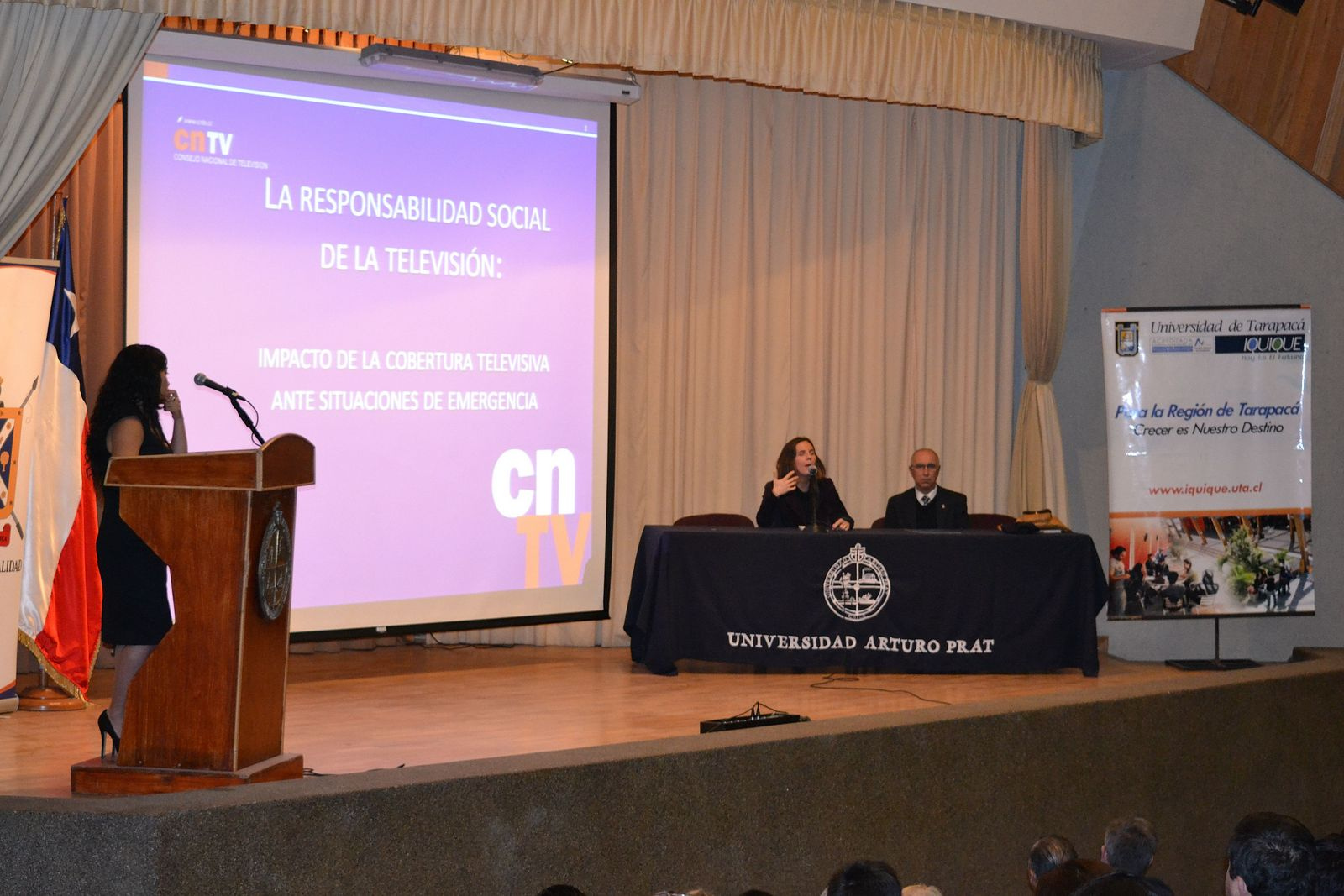 Foro panel "La responsabilidad social de la televisión: impacto de la cobertura televisiva ante situaciones de emergencia.